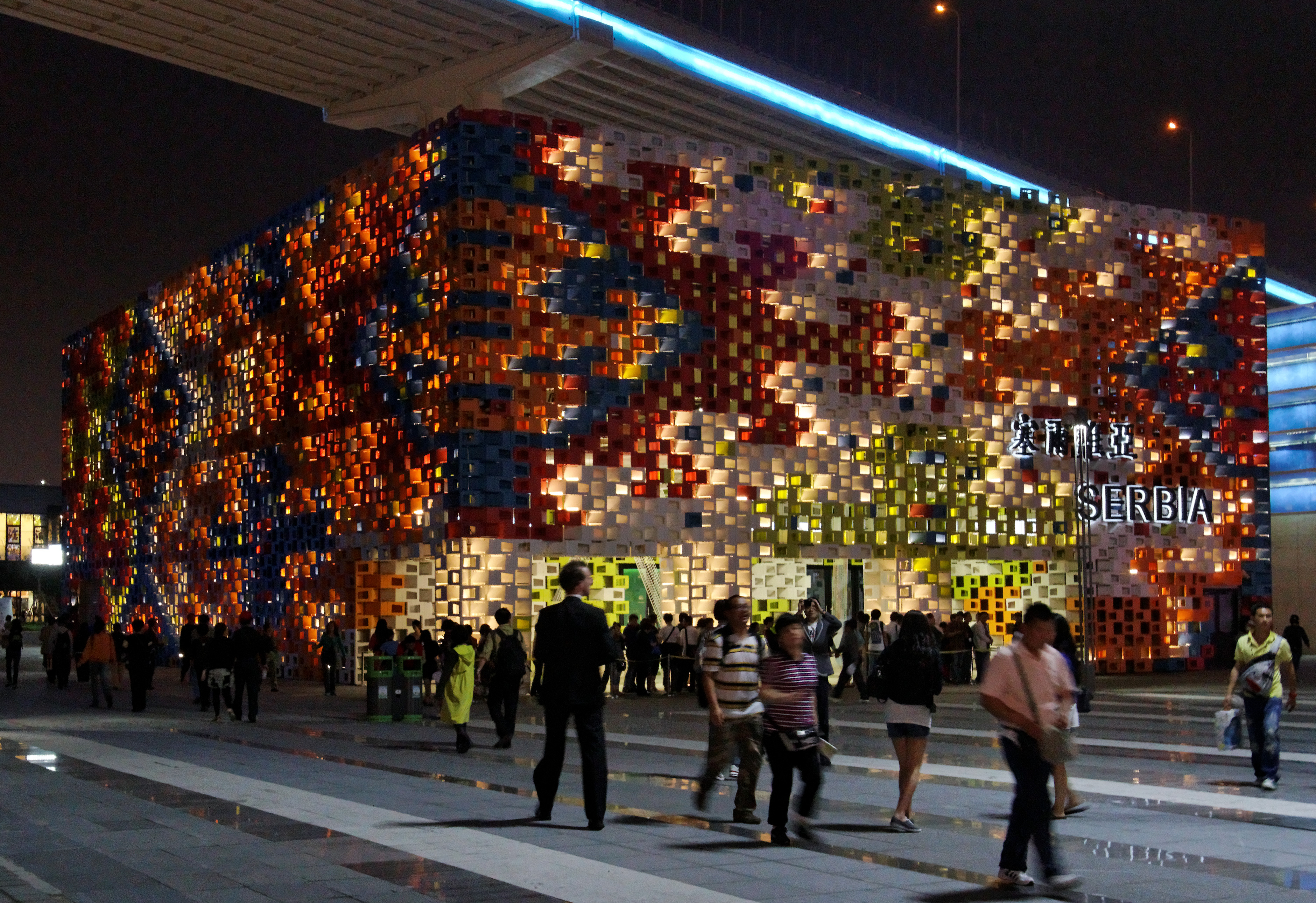 Serbia pavilion, EXPO 2010, Shanghai, China